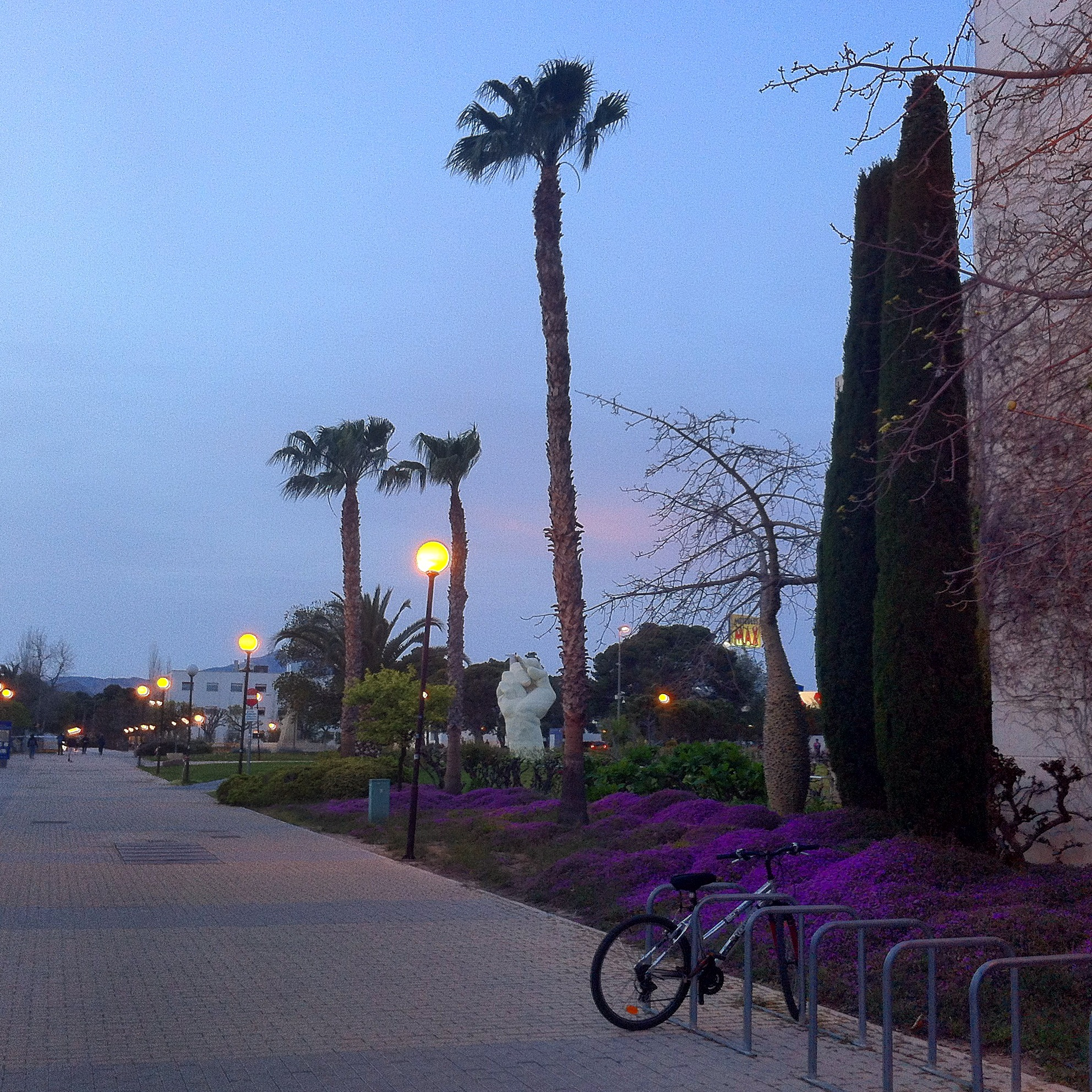 Университет Аликанте в сумерках, весна 2016